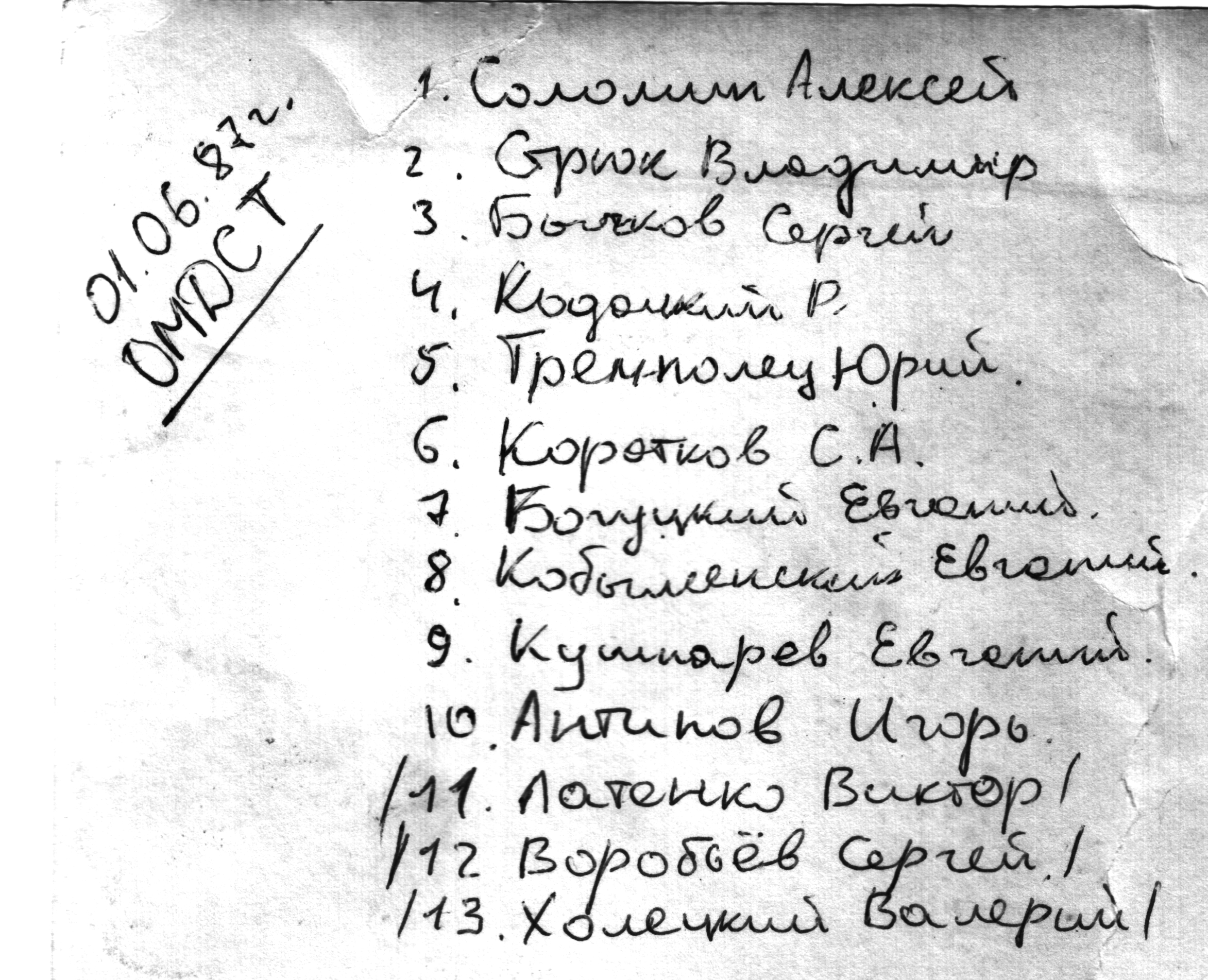 Тыльная сторона снимка